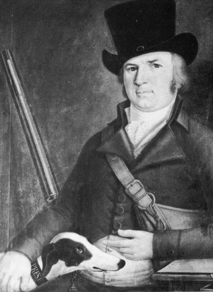 Ignaz Sigismund Freiherr von Rotberg (1758-1819), Landvogt des Hochstifts Basel für die Landvogtei Schliengen 1788-1802